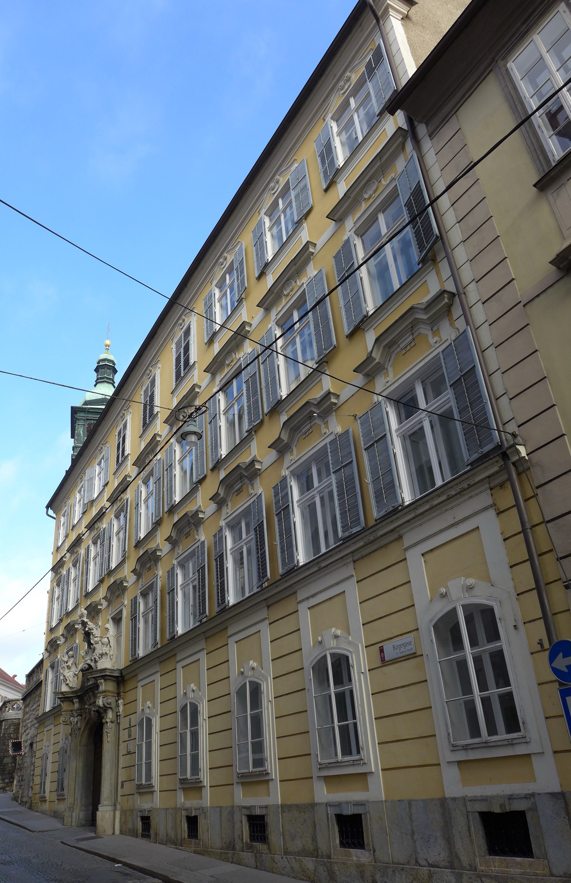 Domherrenhof Graz Außenansicht